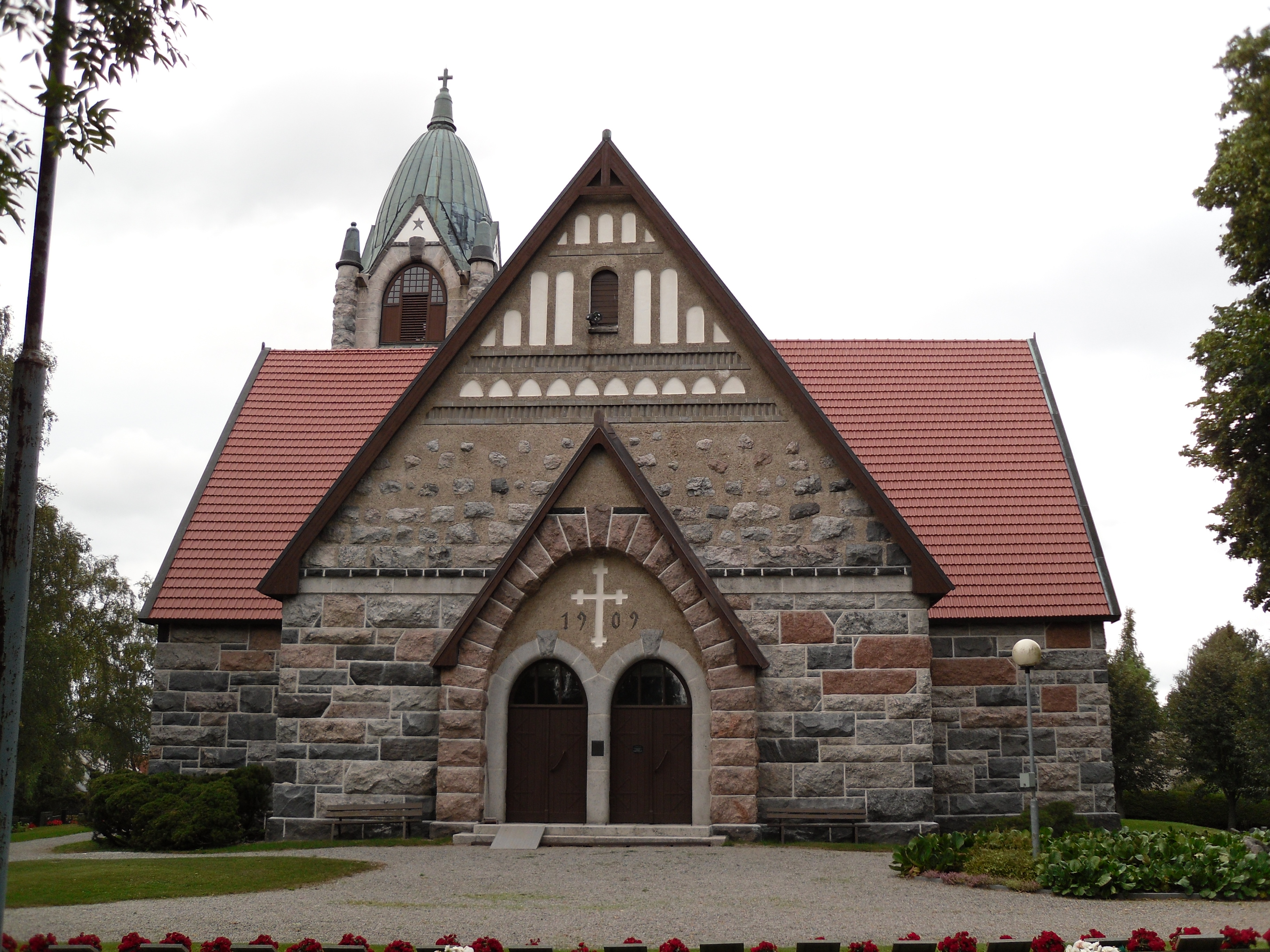 Pyhärannan harmaakivikirkko